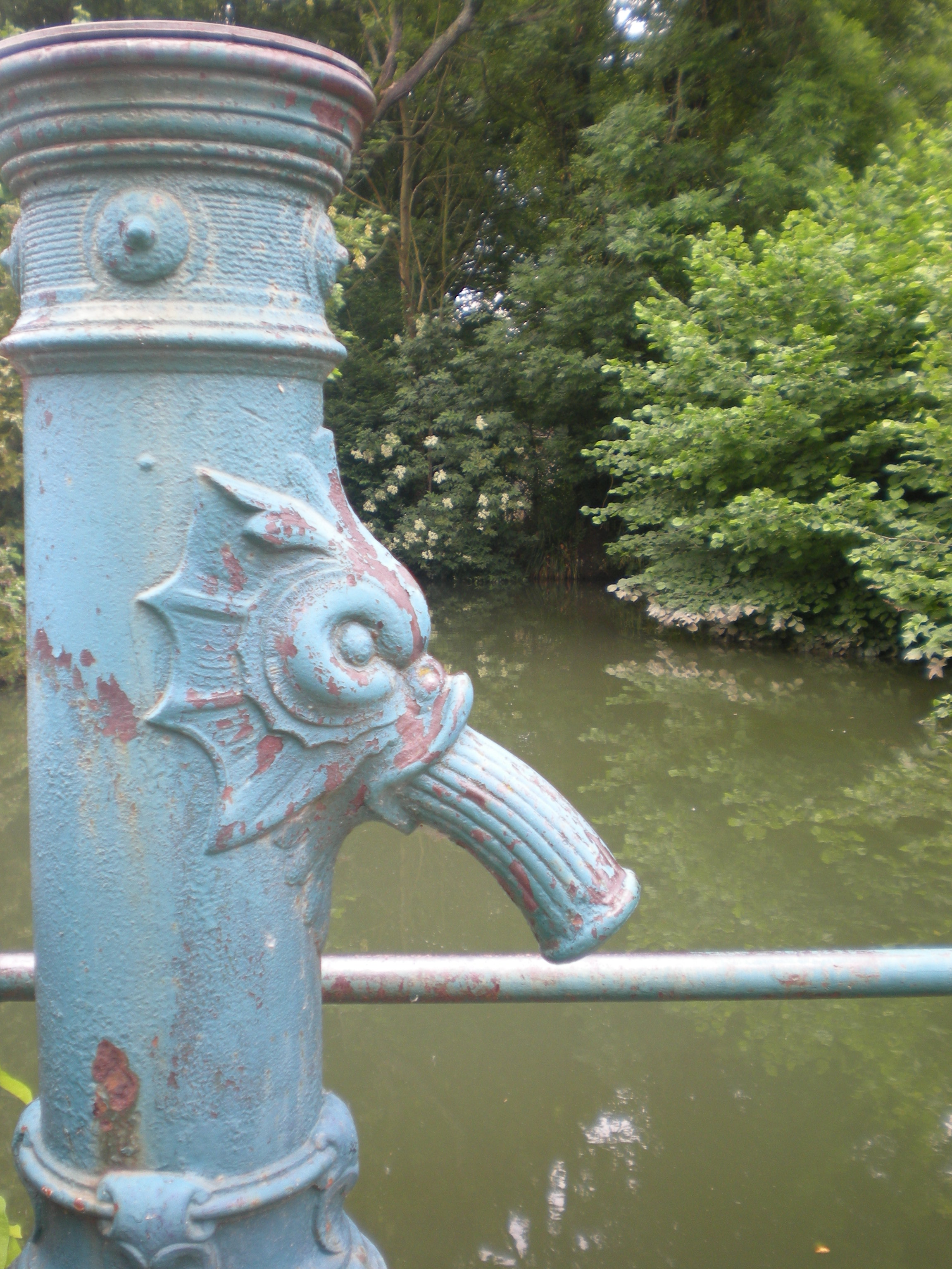 mare à nointel